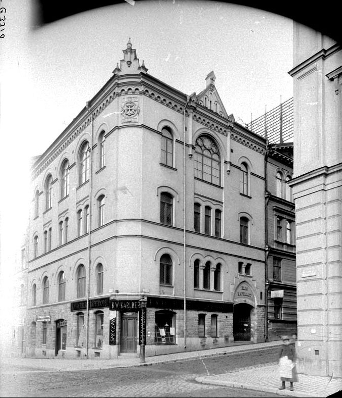 Elimkapellet på Storgatan 26 i hörnet av Styrmansgatan 29 t.v.